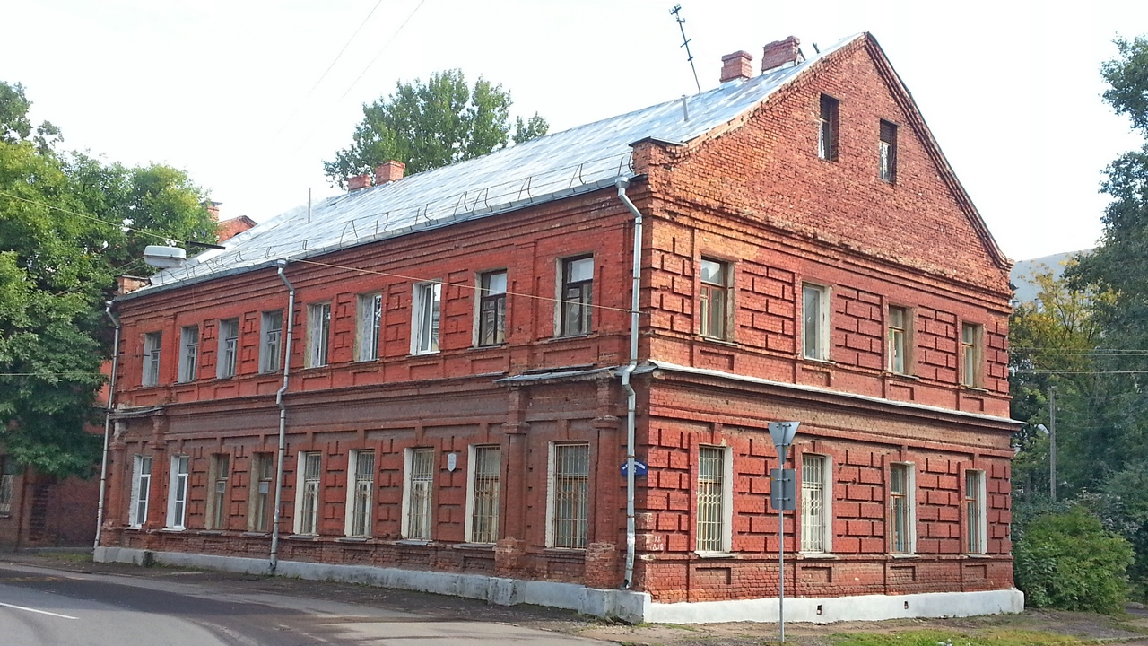 Беларуская (тарашкевіца): Забудова вул. Камсамольскай This is a photo of Belarusian heritage monument. Reference number: 213Г000034 ( WLM)